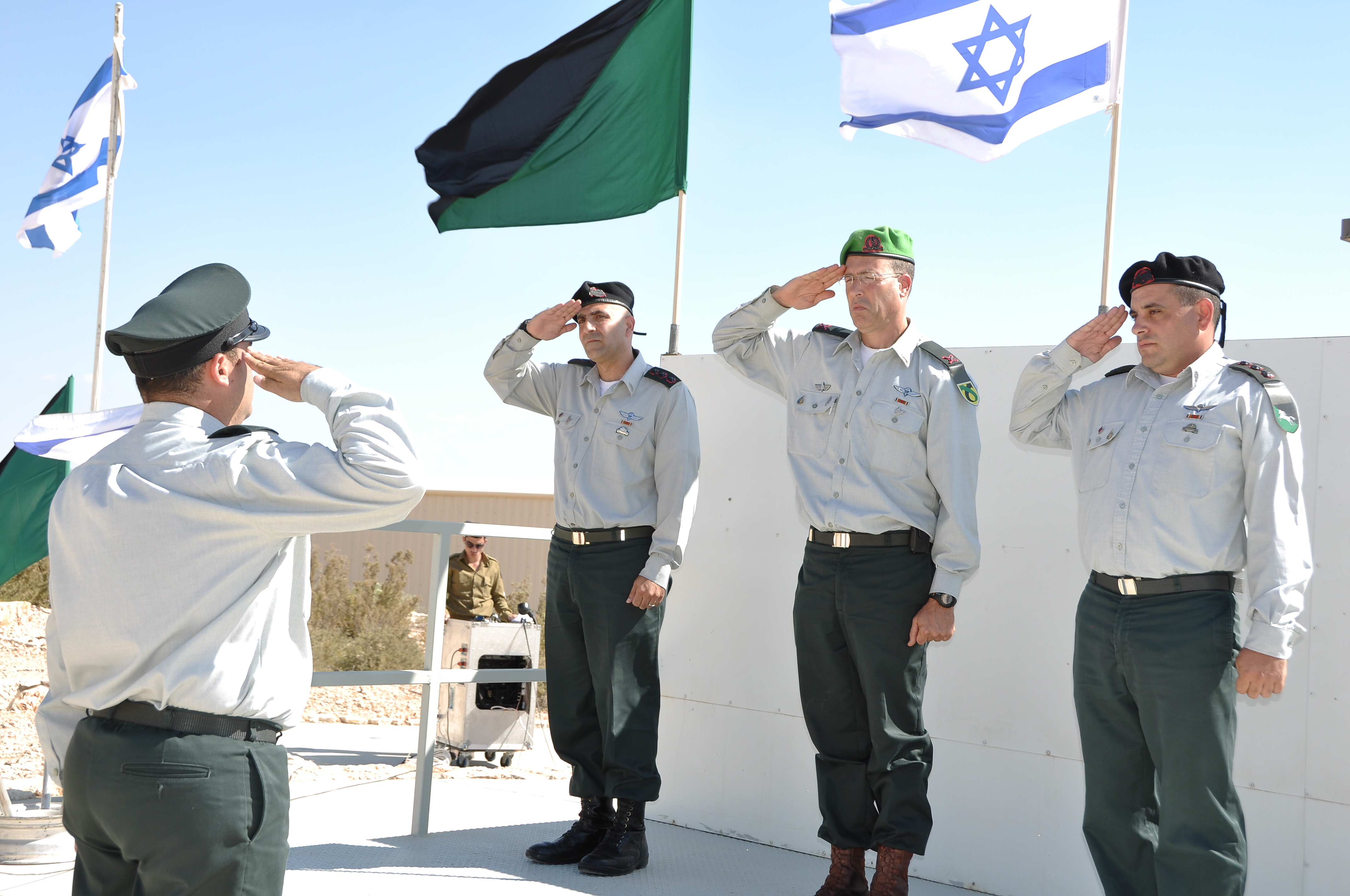 טקס החלפת מפקדי חטיבה . מימין המח"ט היוצא - אל"מ גיא חסון, במרכז -מפקד האוגדה תא"ל אמיר אבולעפייה, משמאל - המח"ט הנכנס -אל"מ רונן דיגמי130